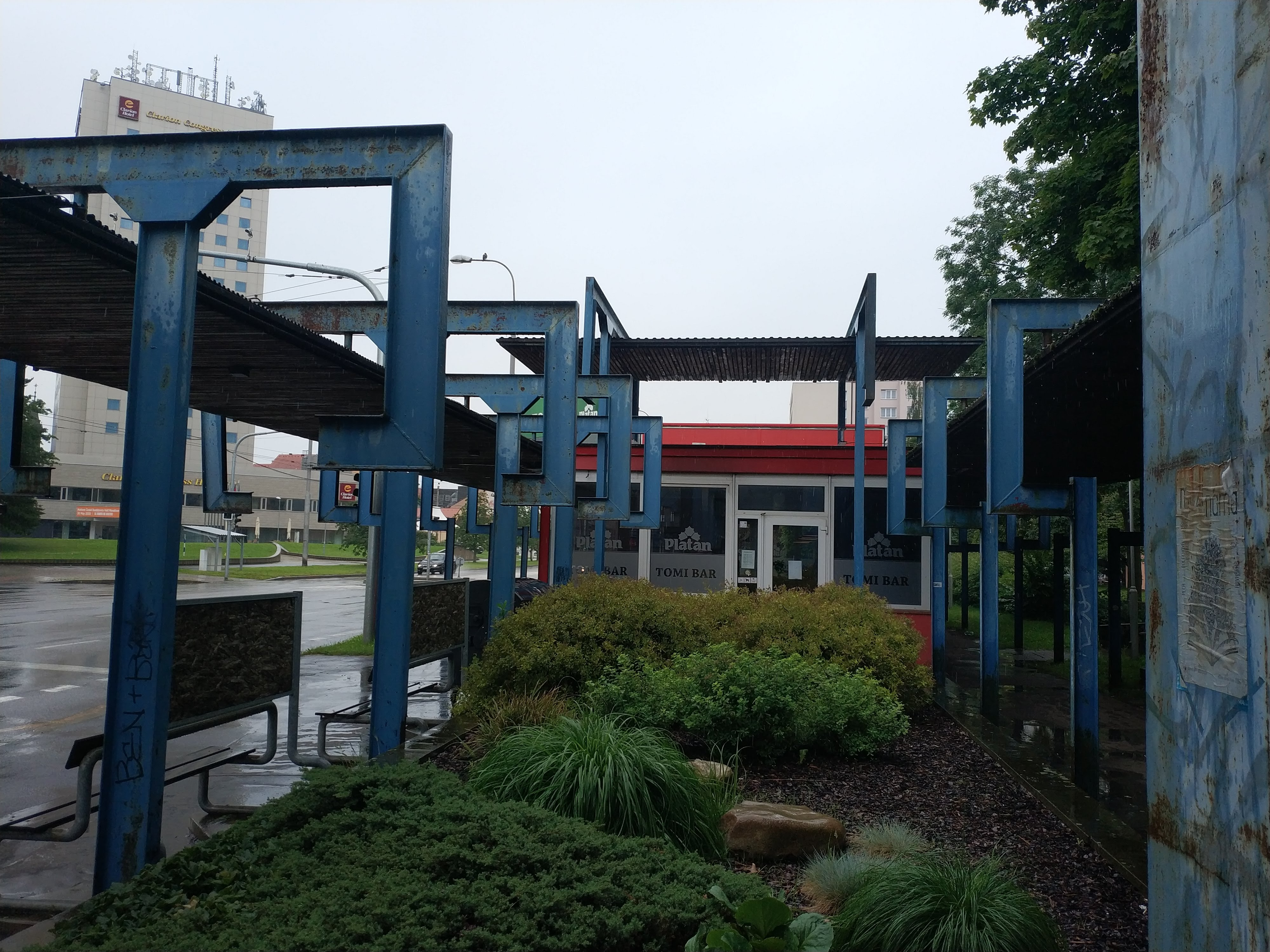 Modré loubí na Pražské třídě v Českých Budějovicích.